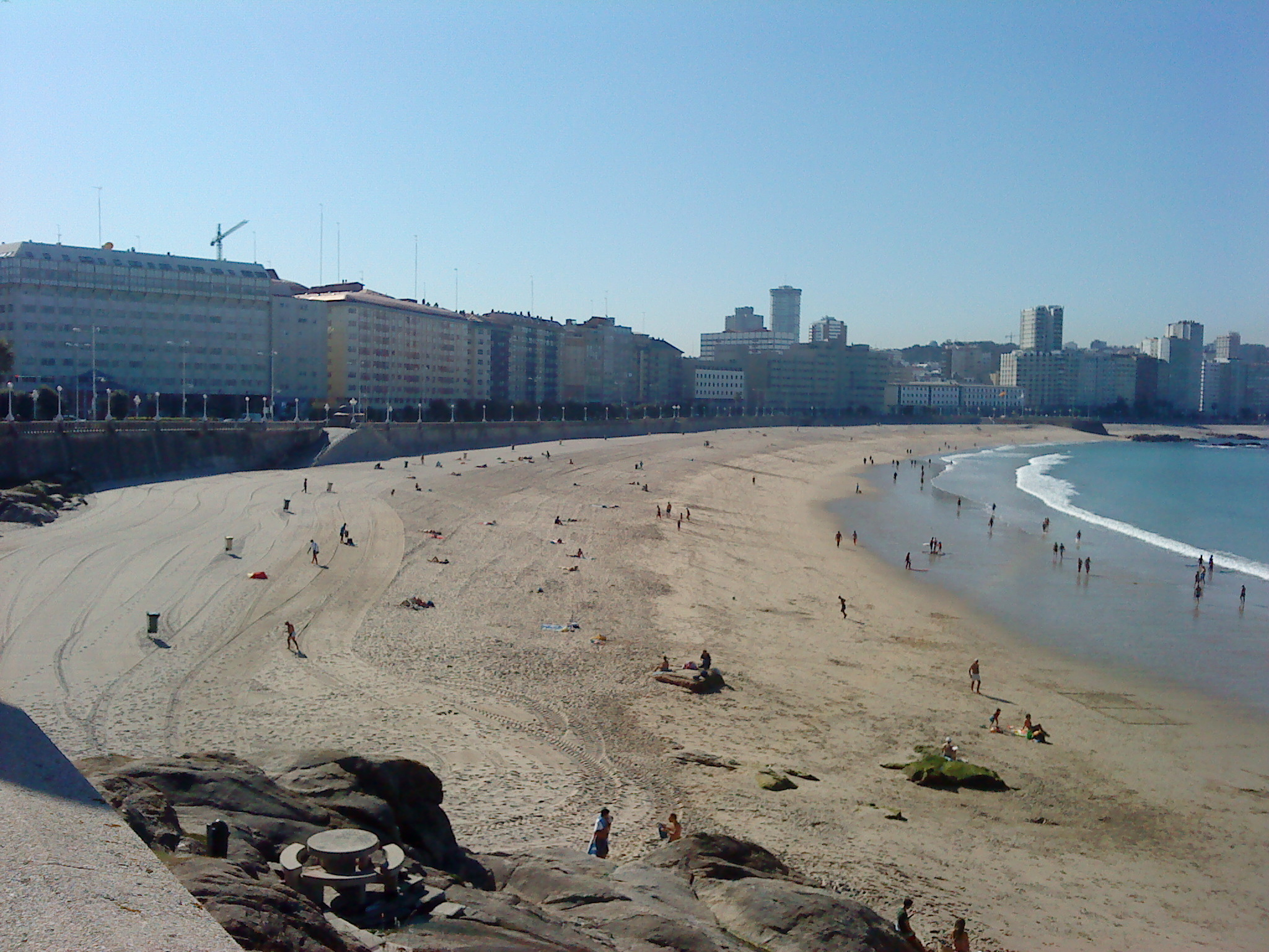 Imagen de la Playa del Orzán, La Coruña, España.